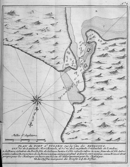 [Illustrations de Voyage autour du monde] Auteur : George Anson Éditeur : Henri-Albert Gosse et Compagnie (Genève) 1750